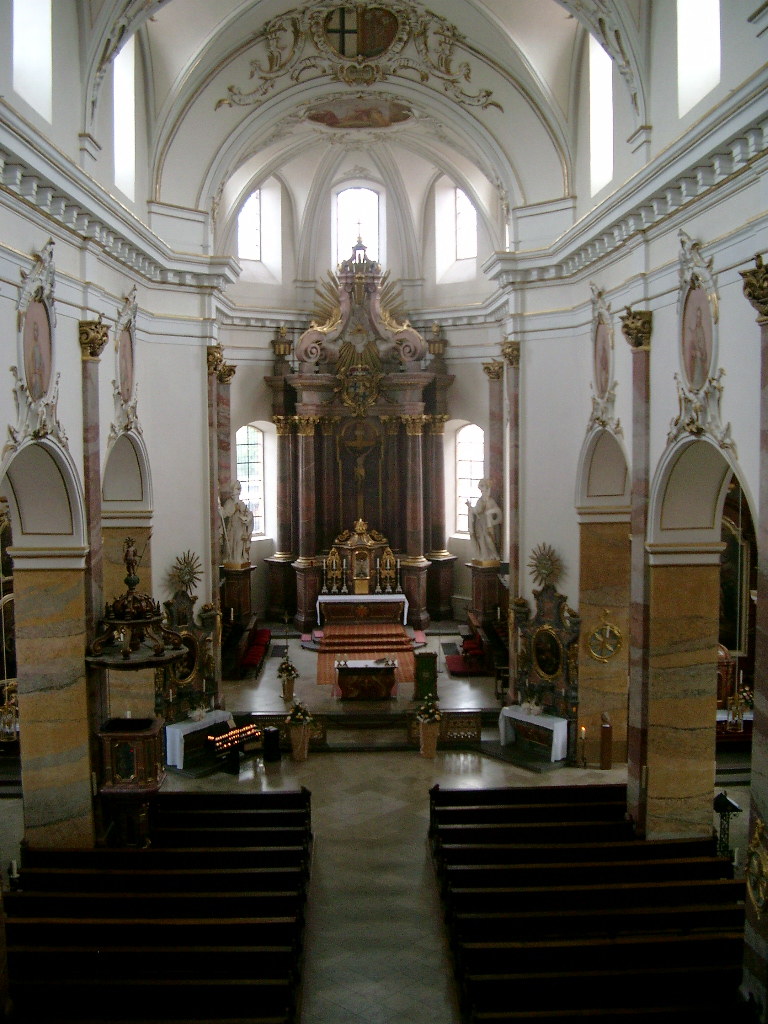 Innenraum der Stadtpfarrkirche von Fulda